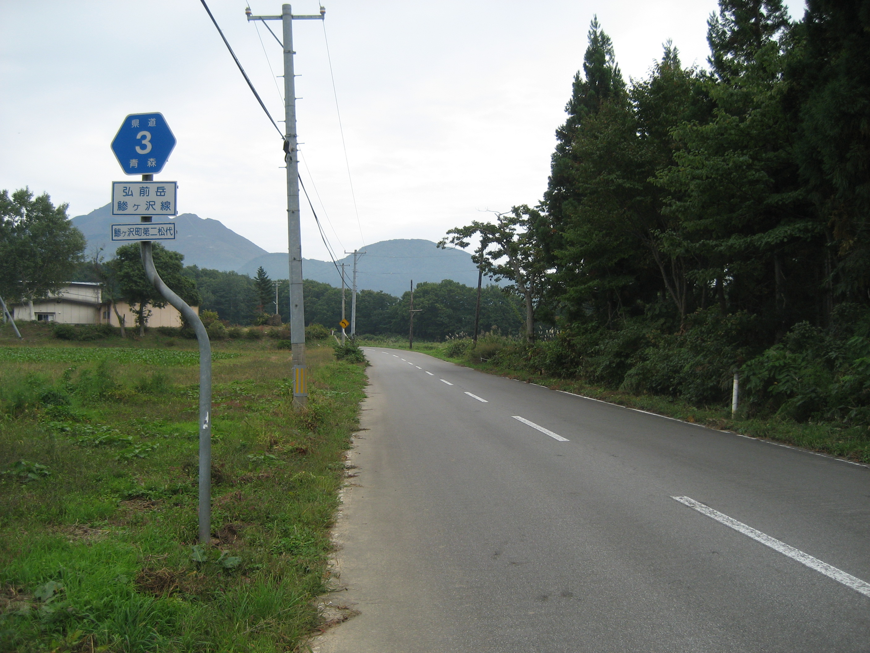 青森県道3号線鰺ヶ沢町第二松代付近